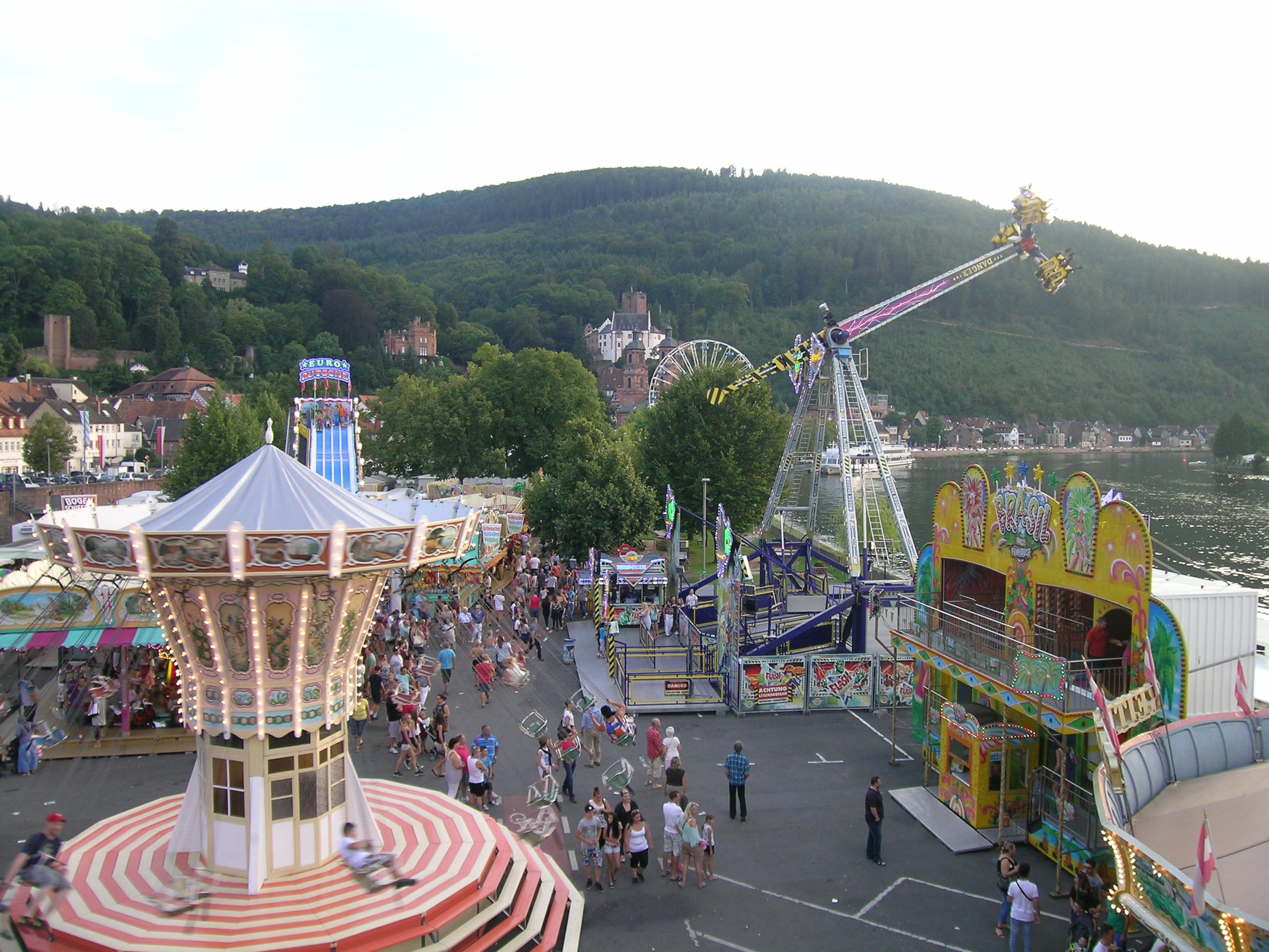 Michaelismesse in Miltenberg 2015